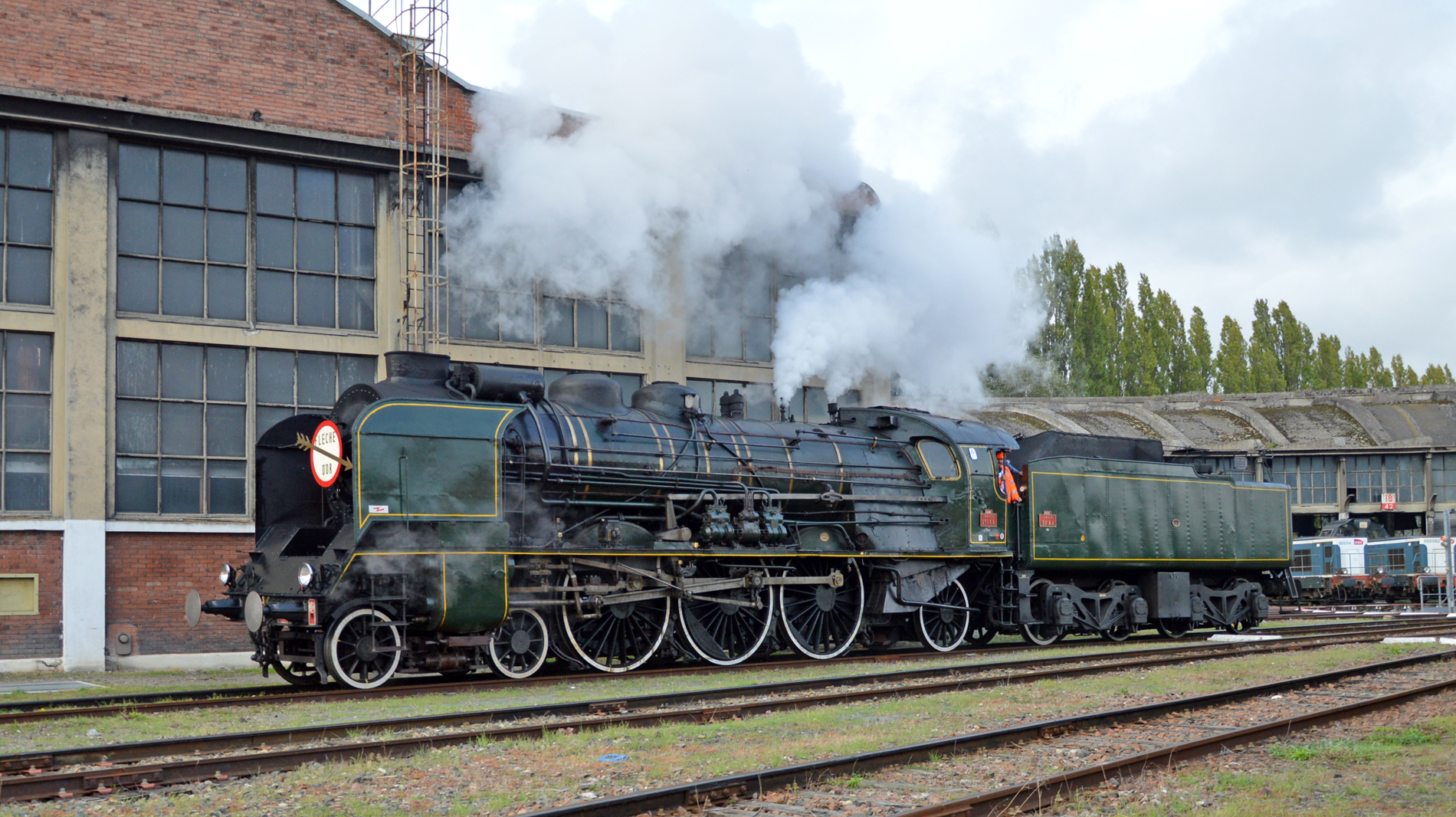 La 231k8 quitte la plaque tournante pour Paris